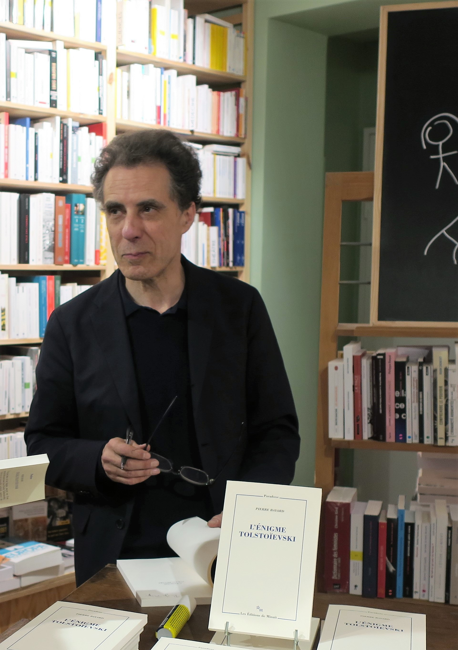 Ở buổi giới thiệu tác phẩm mới